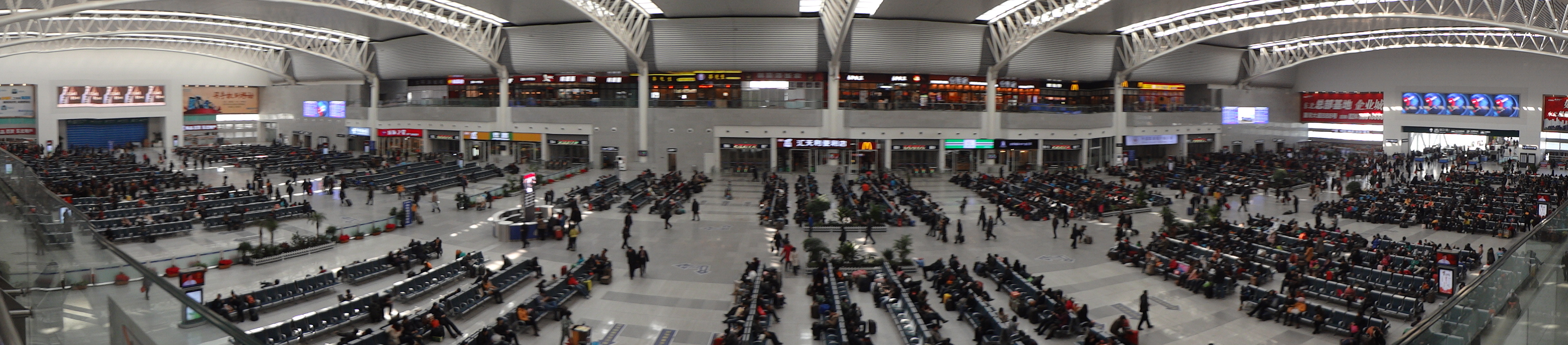 Jinlang Shangquan, Shenyang, Liaoning, China